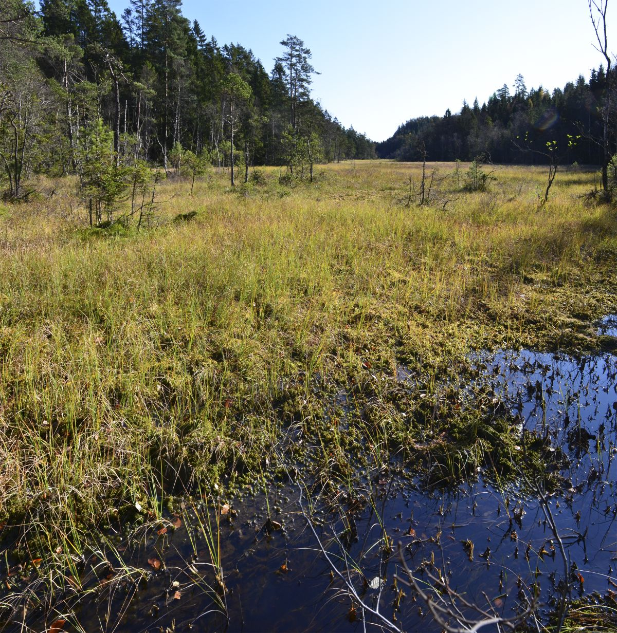 Stormyr er en artsfattig flatmyr.